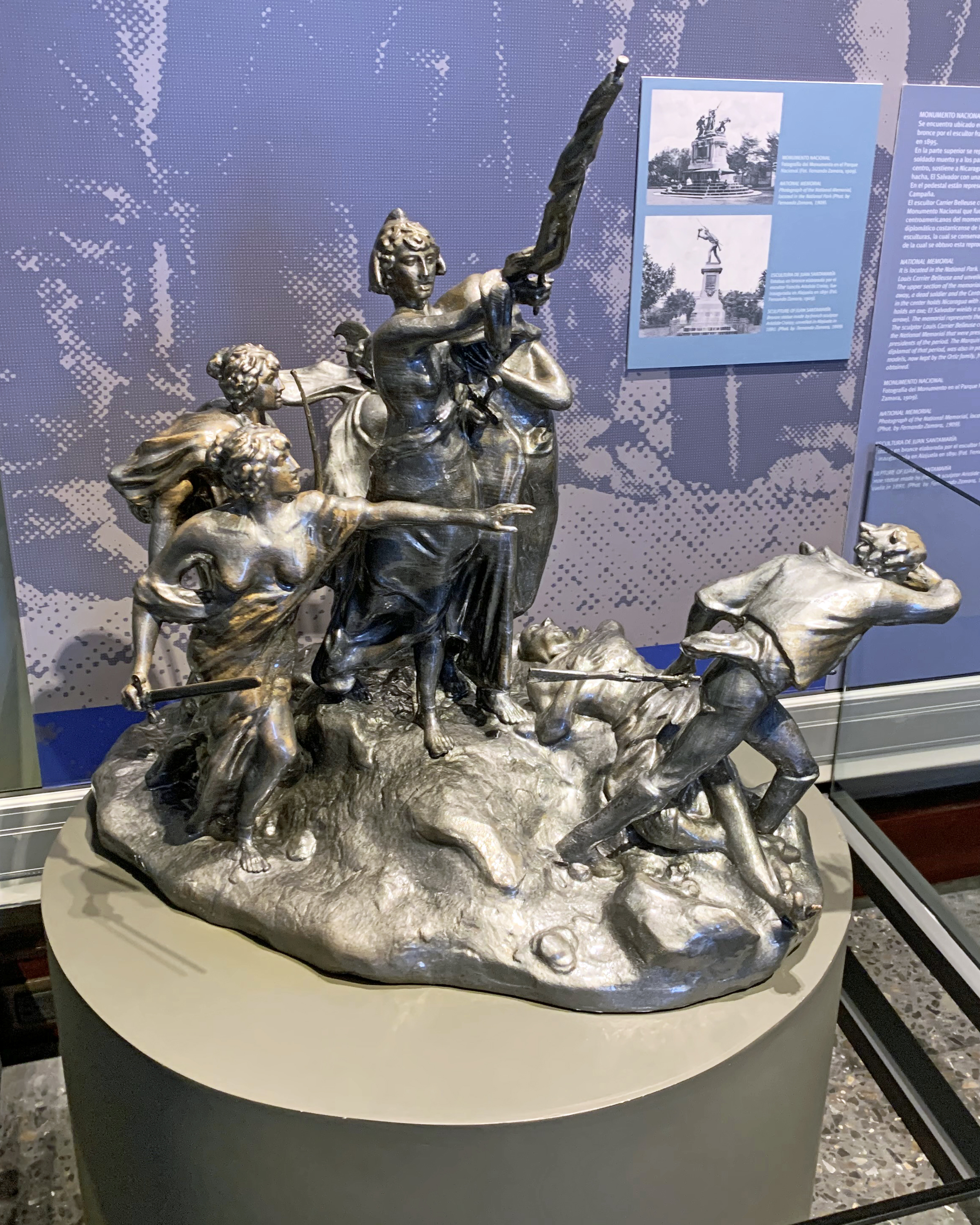 Reproducción del modelo a escala creado por el escultor francés Louis-Robert Carrier-Belleuse del Monumento Nacional, exhibido en el Museo Nacional de Costa Rica, San José. Cada uno de los cinco presidentes centroamericanos del momento recibió un modelo a escala.